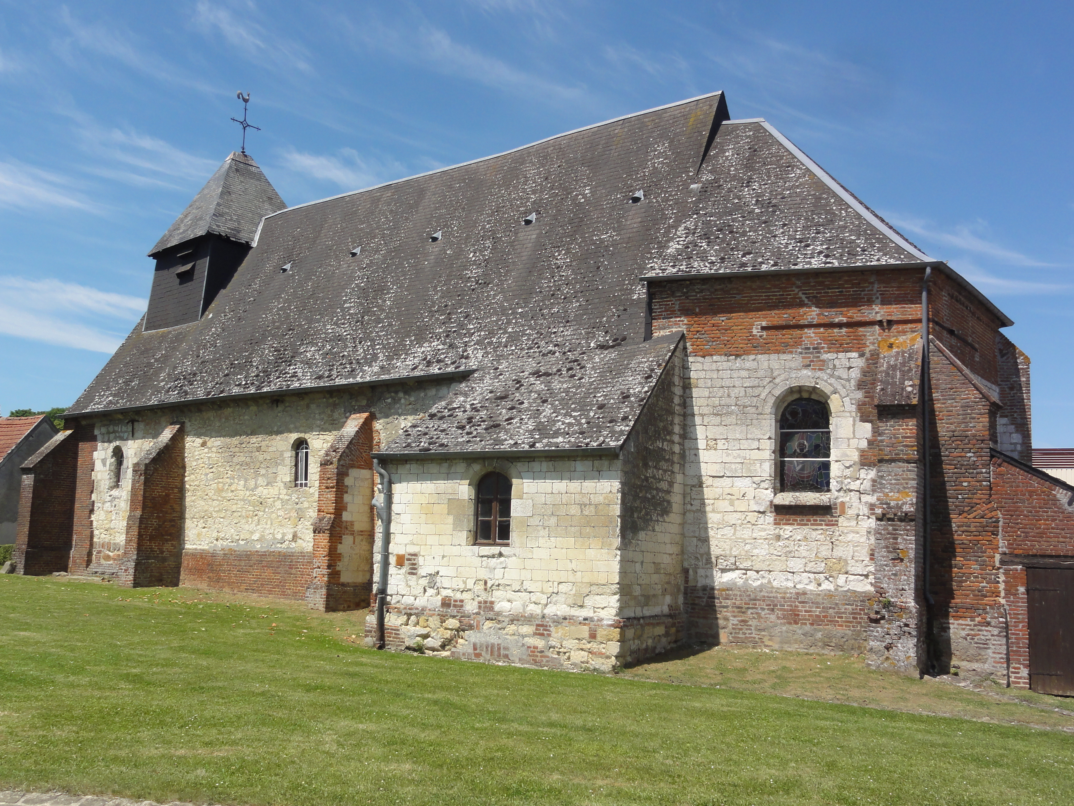 La Neuville-Housset (Aisne) église